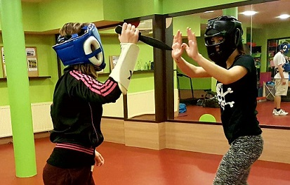 nácvik obrany proti noži